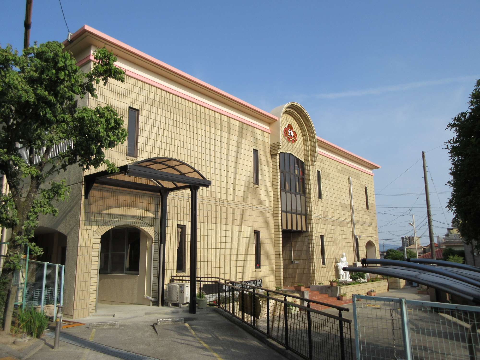 岡崎市立梅園こども園（岡崎市洞町）